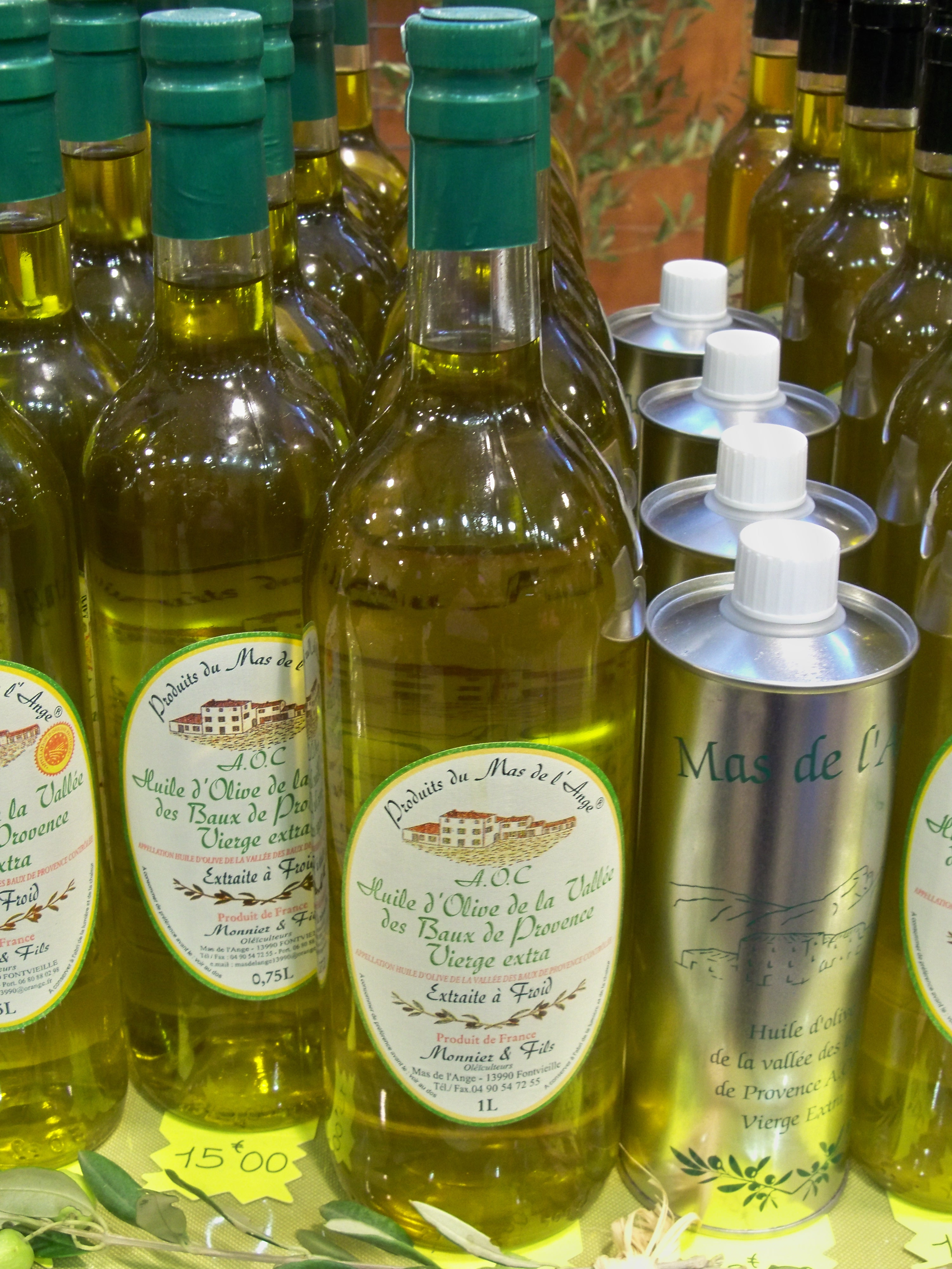 Huile d'olives des Baux de Provence